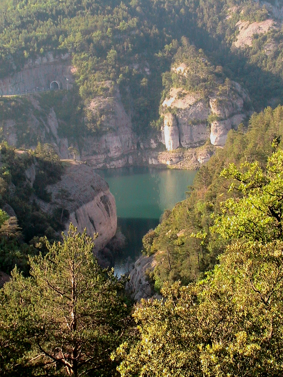 Desembocadura de la Rasa de Tarruella a la Llosa del Cavall, a l'indret anomenat Clot de l'Infern, Vall de Lord (Solsonès - Catalunya)